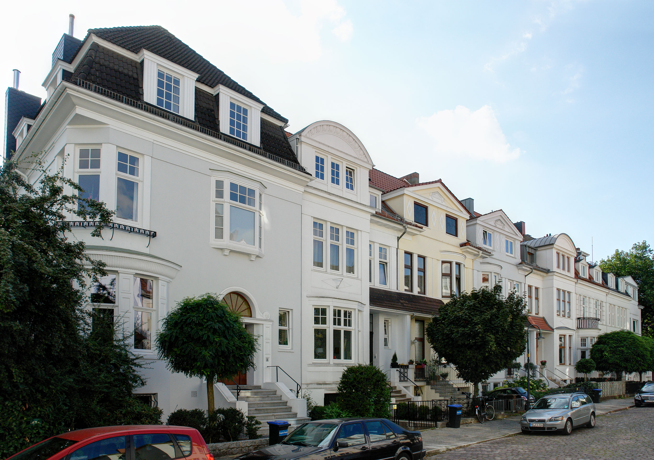 Wohnhausgruppe in Bremen, Delbrückstraße 1–15Die Denkmalgruppe ist ein geschütztes Kulturdenkmal in der Freien Hansestadt Bremen, mit der Nr. 0865 beim Landesamt für Denkmalpflege registriert.